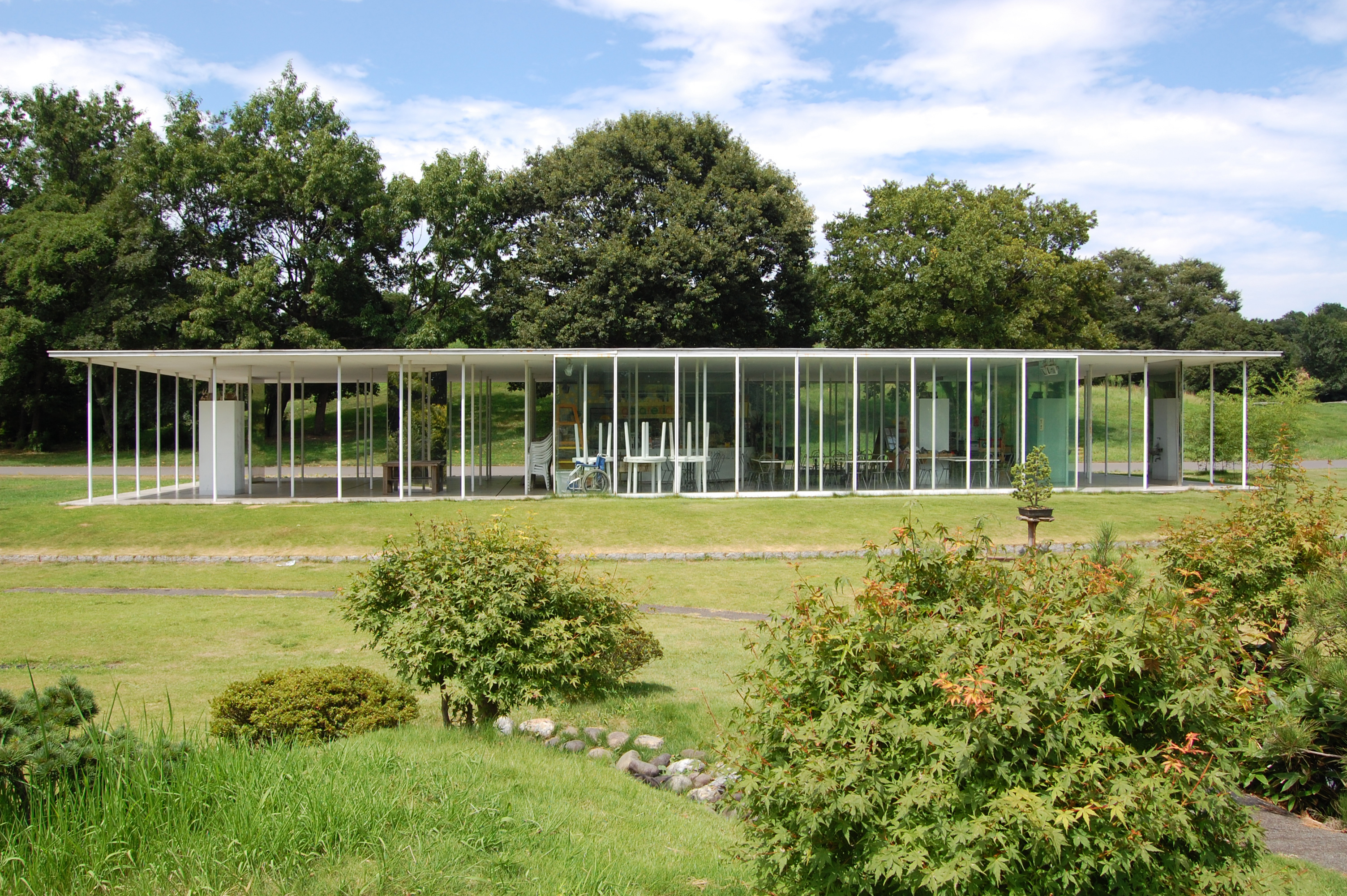 Koga Park Café, Ibaraki, Japan, Design by SANAA ( Kazuyo Sejima + Ryue Nishizawa ) in 1998